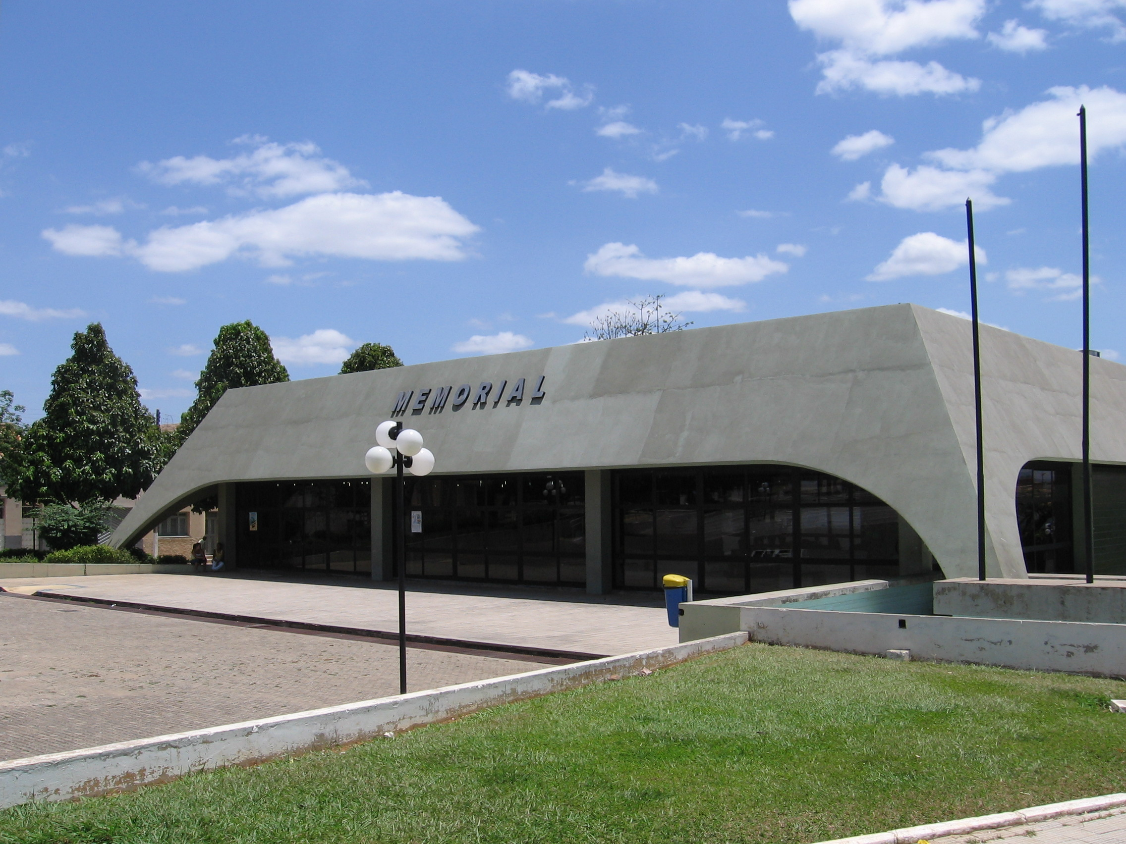 Memorial do Padre Cícero em Juazeiro do Norte, Ceará. Foto de Allan Patrick, tirada em 21 de setembro de 2006.